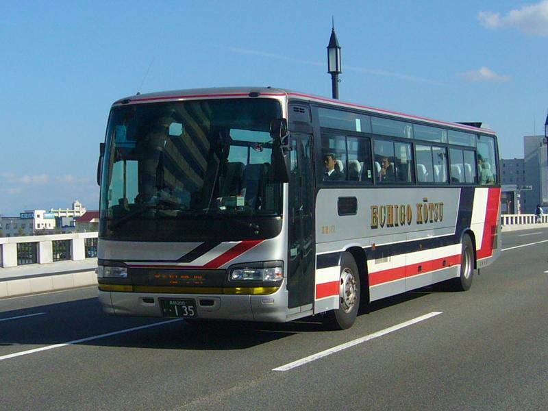 越後交通所属のバス。登録番号 長岡200か・135。新潟～柏崎線用。万代橋にて撮影。